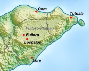 Physische Positionskarte des Fuiloro-Plateaus